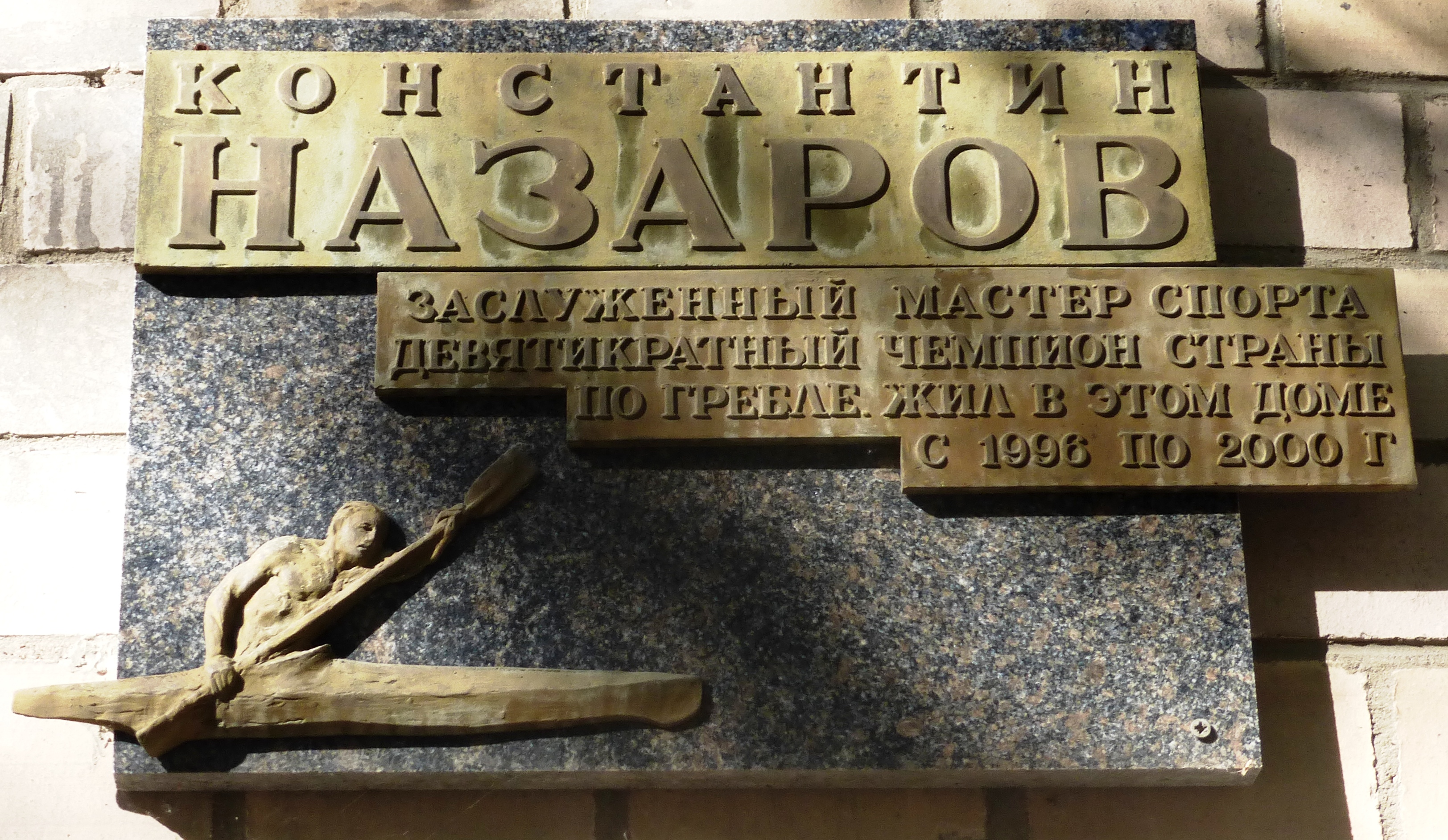 Памятная доска Константину Васильевичу Назарову (1933—2000) — заслуженному мастеру спорта СССР (1970), Заслуженному работнику культуры Карельской АССР. Установлена в Петрозаводске на здании по ул.Свердлова, 22.